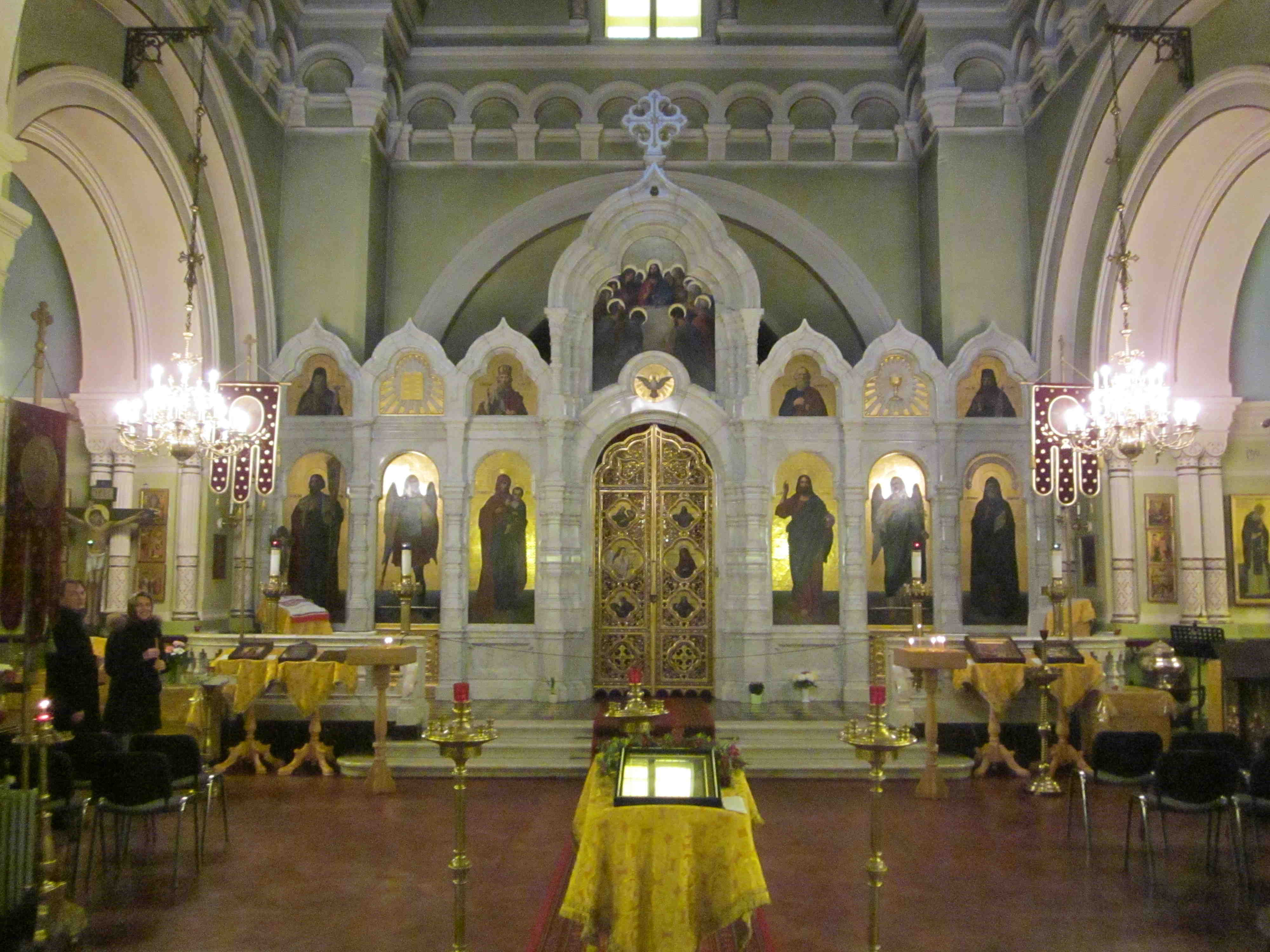 Russisch-Orthodoxe Kirche, Dresden